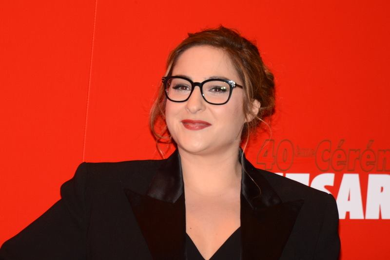 Marilou Berry à la cérémonie des César